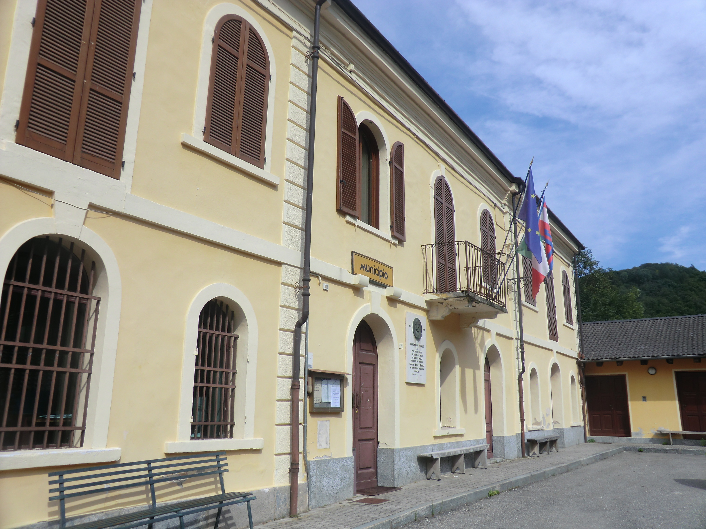 Rittana (Cuneo): municipio